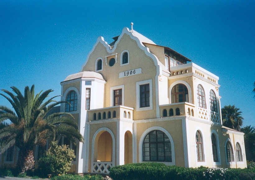 Auteur de la photo : FC Georgio Sujet : Tribunal de Swakopmund Année : 1996